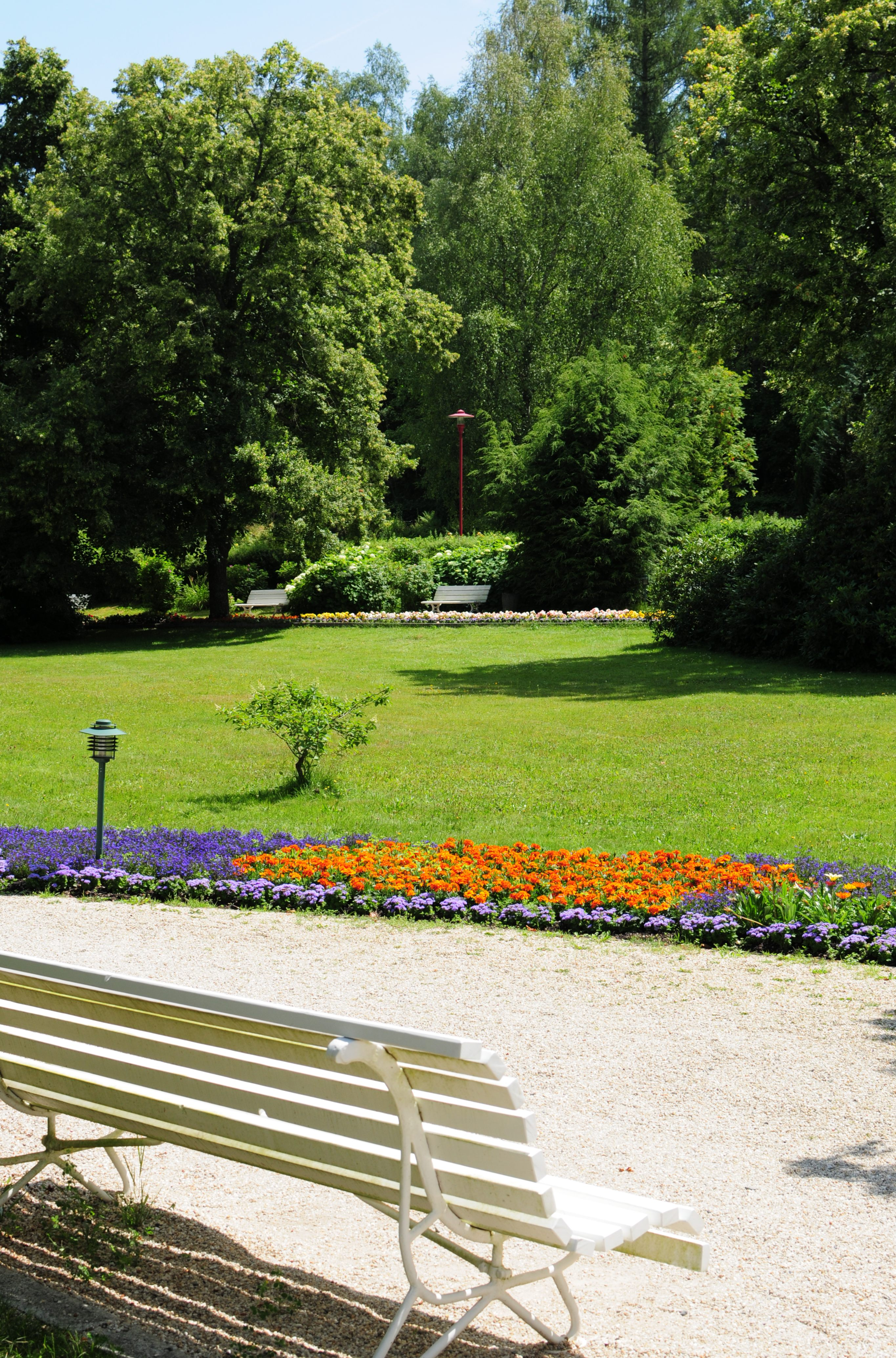 Gemeinde Bad Brambach, Kurpark Bad Brambach (Vogtlandkreis, Freistaat Sachsen, Deutschland)